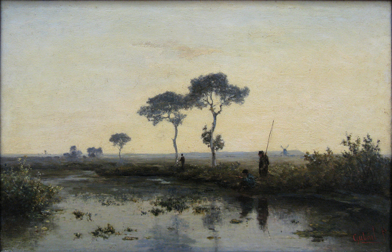 Vissers aan het water / Paul Gabriël (1828 - 1903). - circa 1878, 0332445 Paul Gabriël (1828-1903) circa 1878